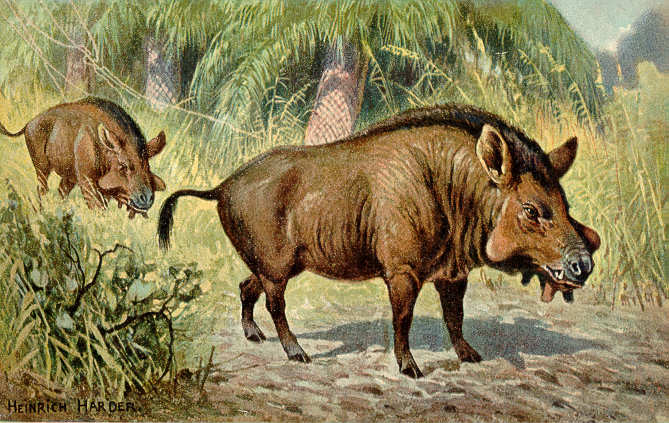 Entelodon Sp.